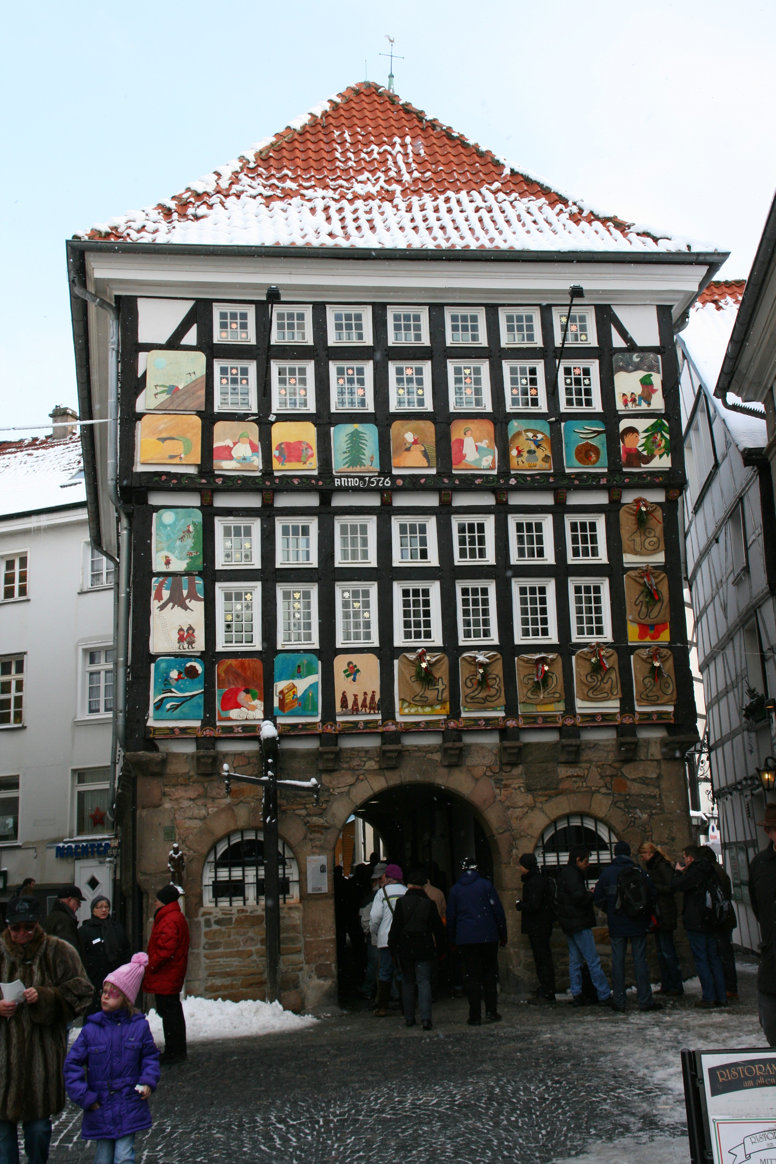 Altes Rathaus am Untermarkt in Hattingen